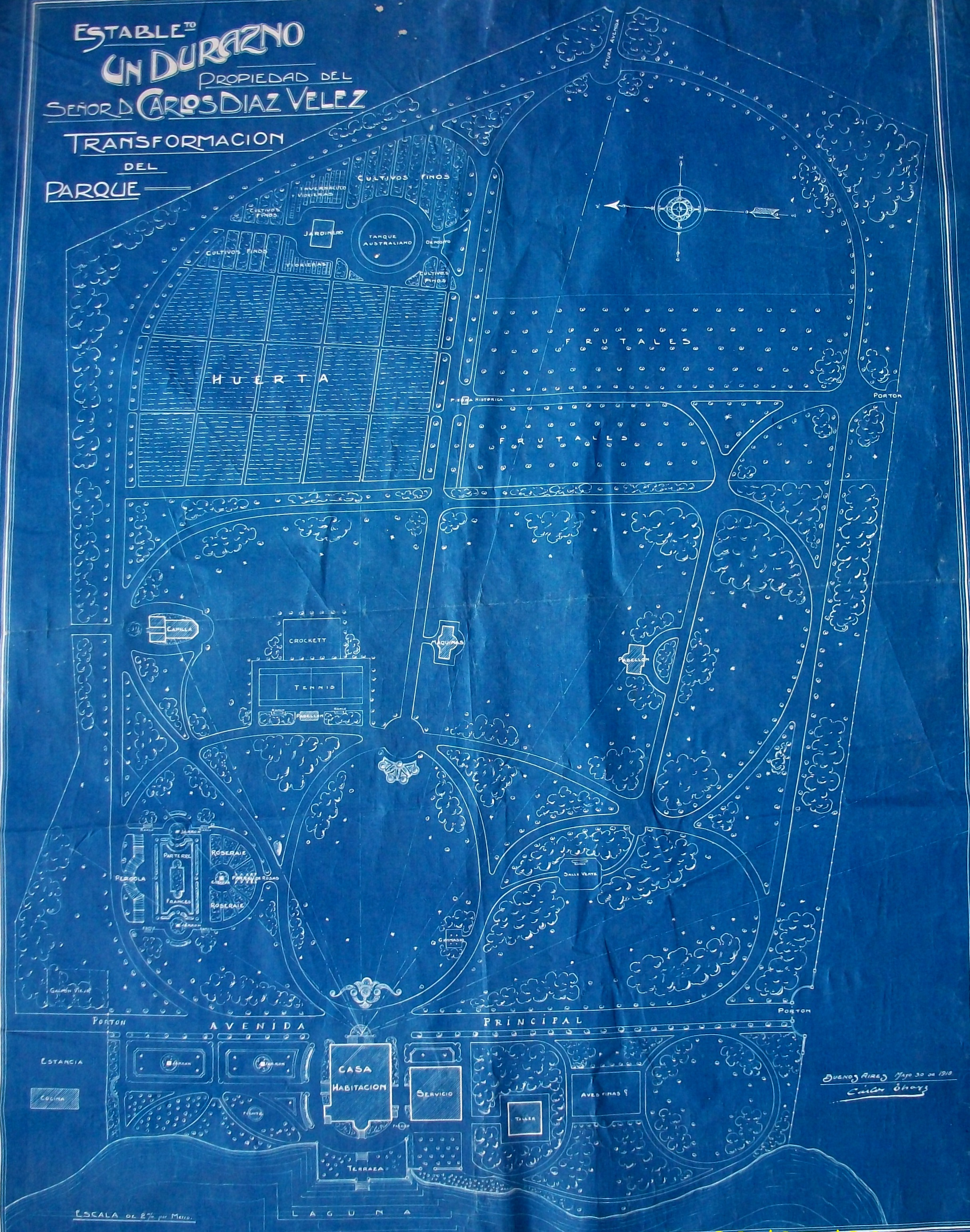 Plano de la transformación del parque del casco de la estancia Un Durazno, partido de Rauch, provincia de Buenos Aires, República Argentina, perteneciente al ingeniero don Carlos Díaz Vélez.